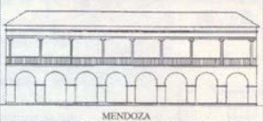 Reconstrucción hipotetica del Cabildo de Mendoza hacia 1749, hecha por J.R. Barcena, D. Schavelzon